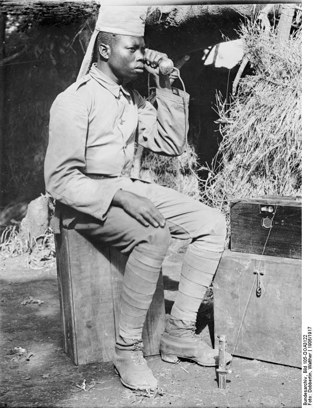 Fernmelder